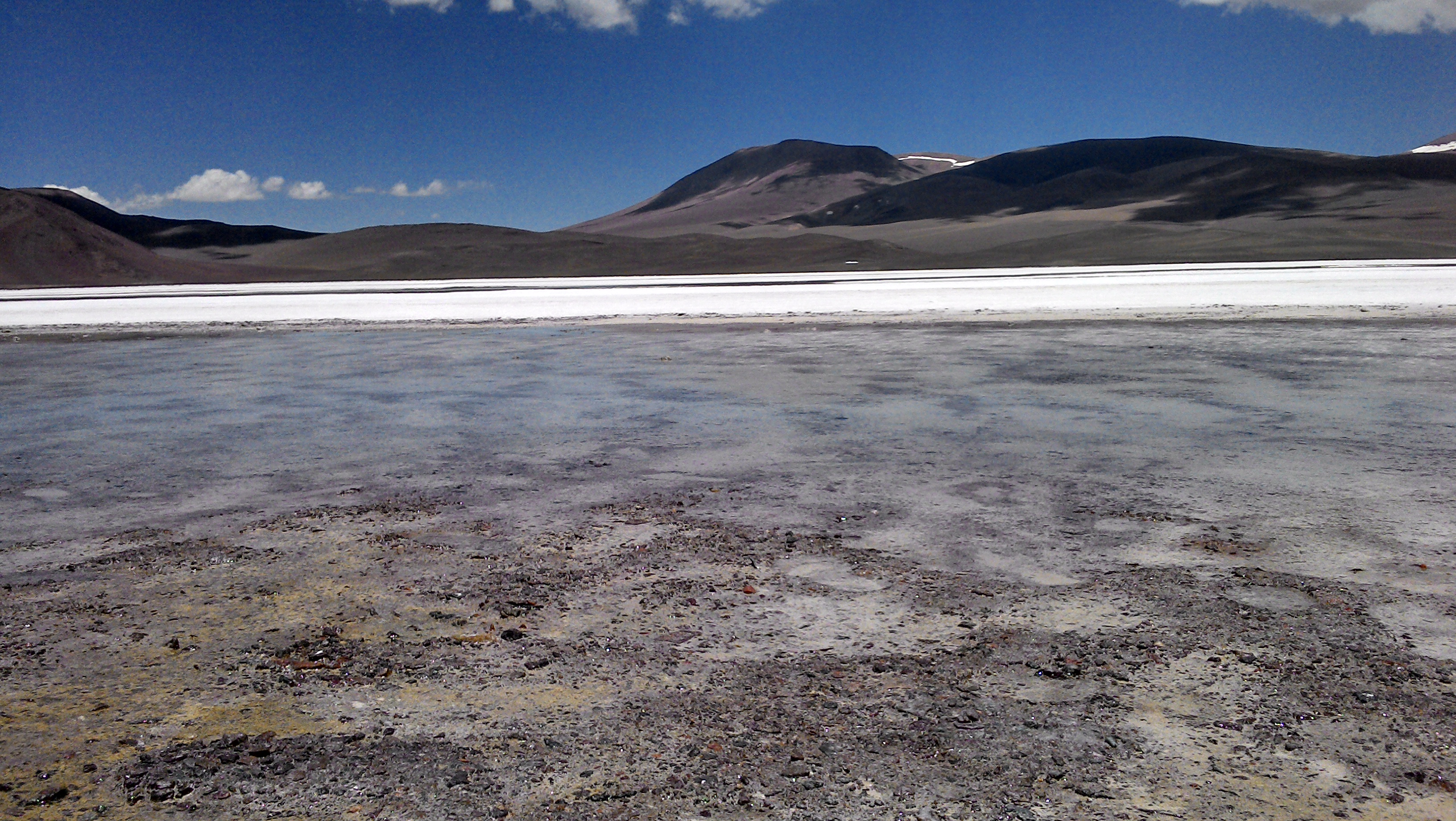 En La Rioja